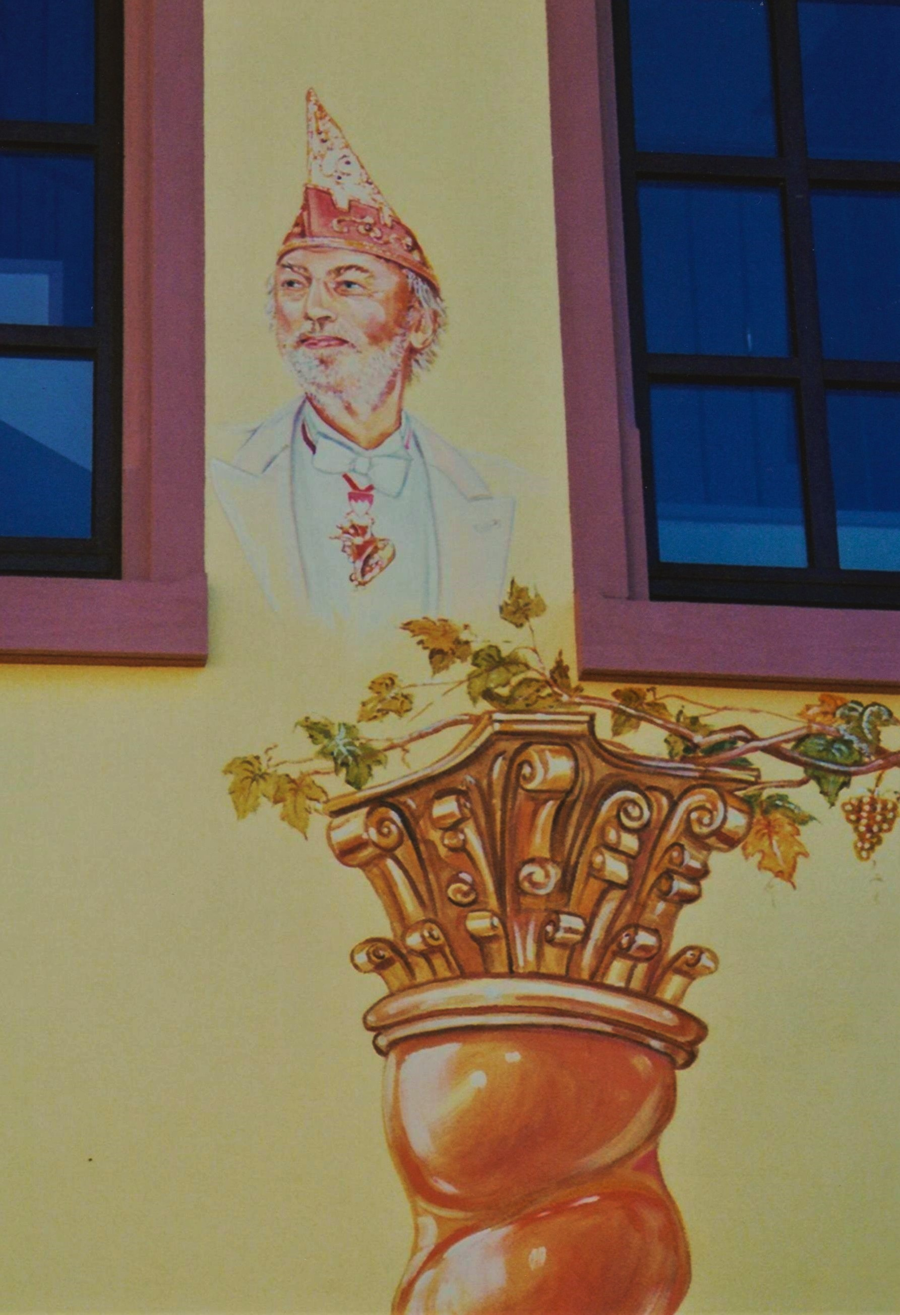 Veitshöchheim, Haus der Fränkischen Fastnacht, Fassadenmalerei (2015) mit Motiven aus der Fernsehsendung „Fastnacht in Franken“: Detlev Wagenthaler, von 1995 bis 2005 Sitzungspräsident der Fernsehsendung